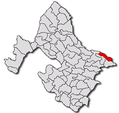 Categorie:Hărţi ale judeţului Mehedinţi